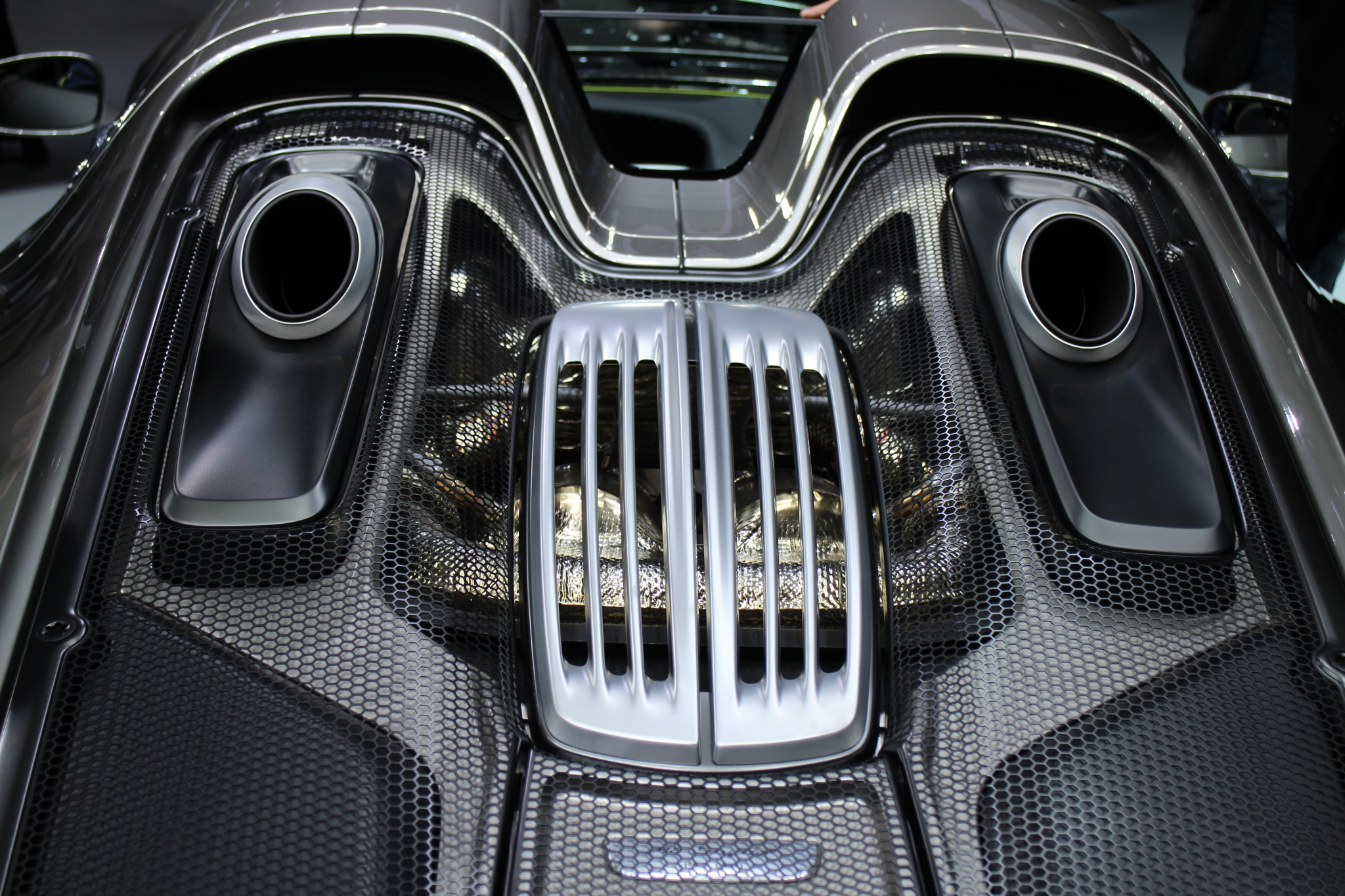 IAA 2013